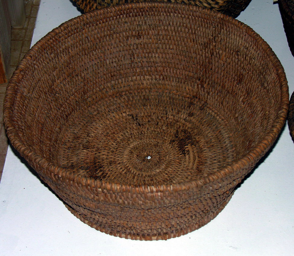 Sėtuvė 2006 m. spalio 27 d.